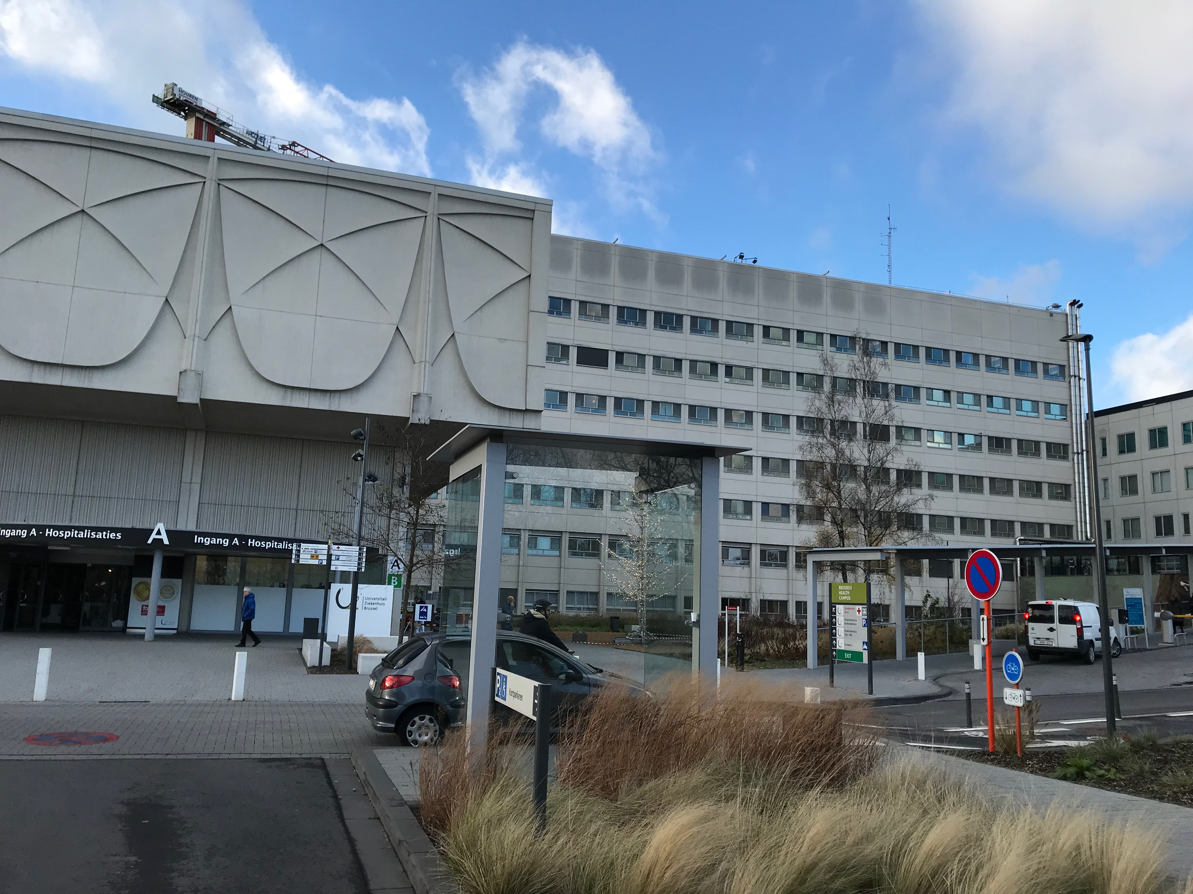 UZ Bruxelles